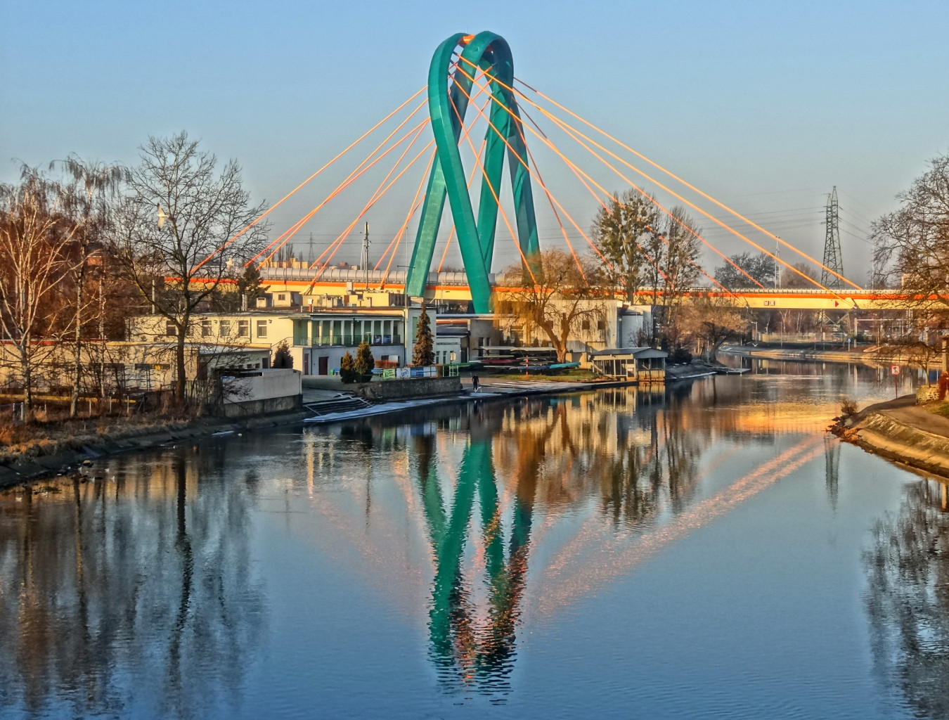 Most Uniwersytecki w Bydgoszczy, pylon o wysokości 69 m